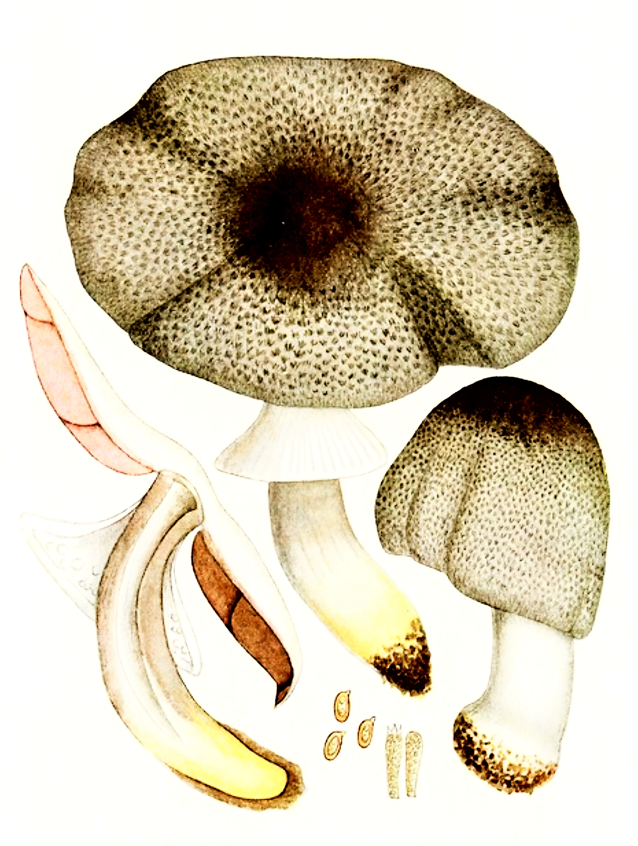 Giacomo Bresadola: Psalliota silvatica (Schaeff.) P. Kumm. (1871) heute Agaricus silvaticus Schaeff. (1774)